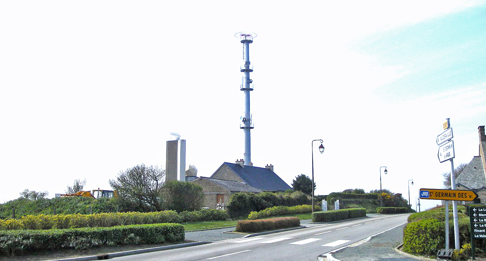 CROSS (Centre régional opérationnel de surveillance et de sauvetage) de Jobourg (Manche, Normandie, France)